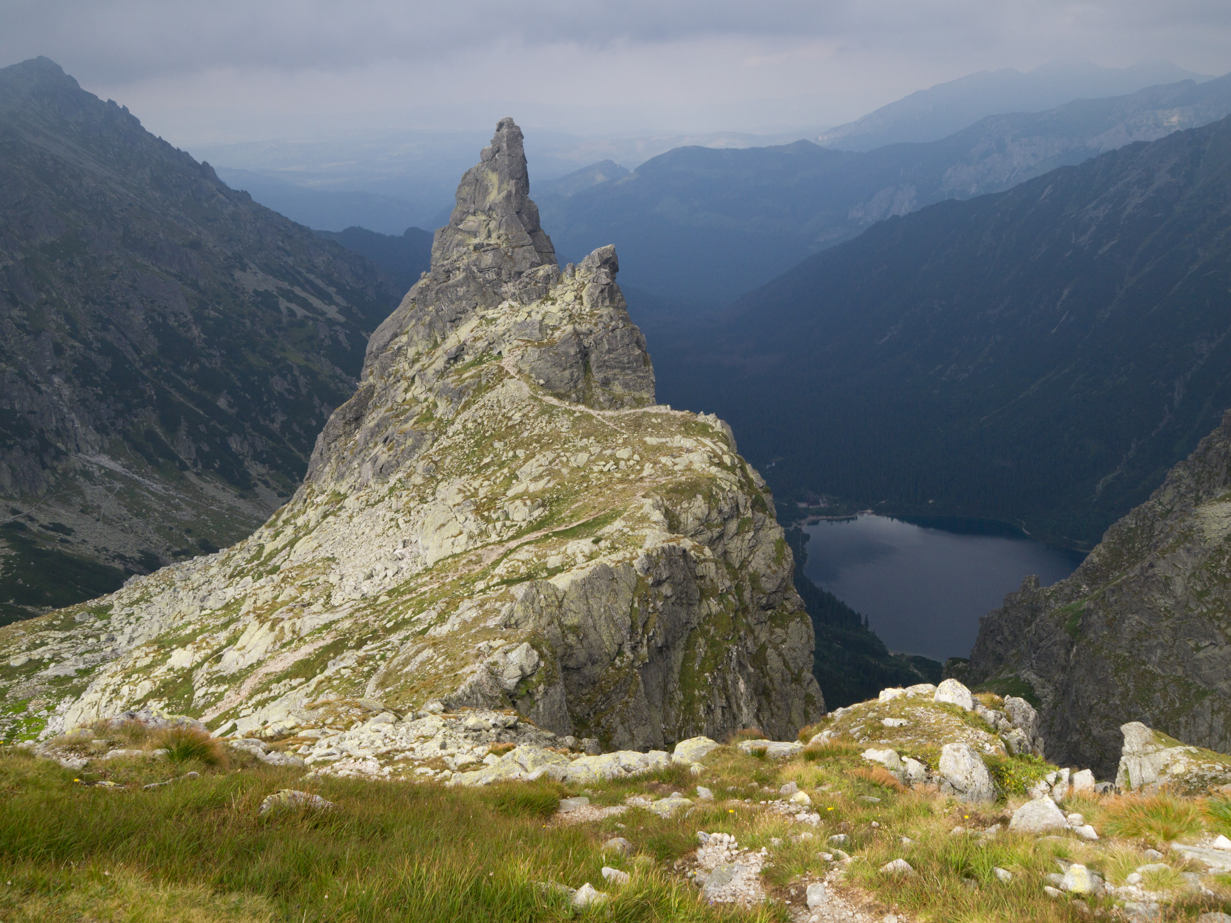 Mnich i Mniszek – widok z Mnichowej Kopy.